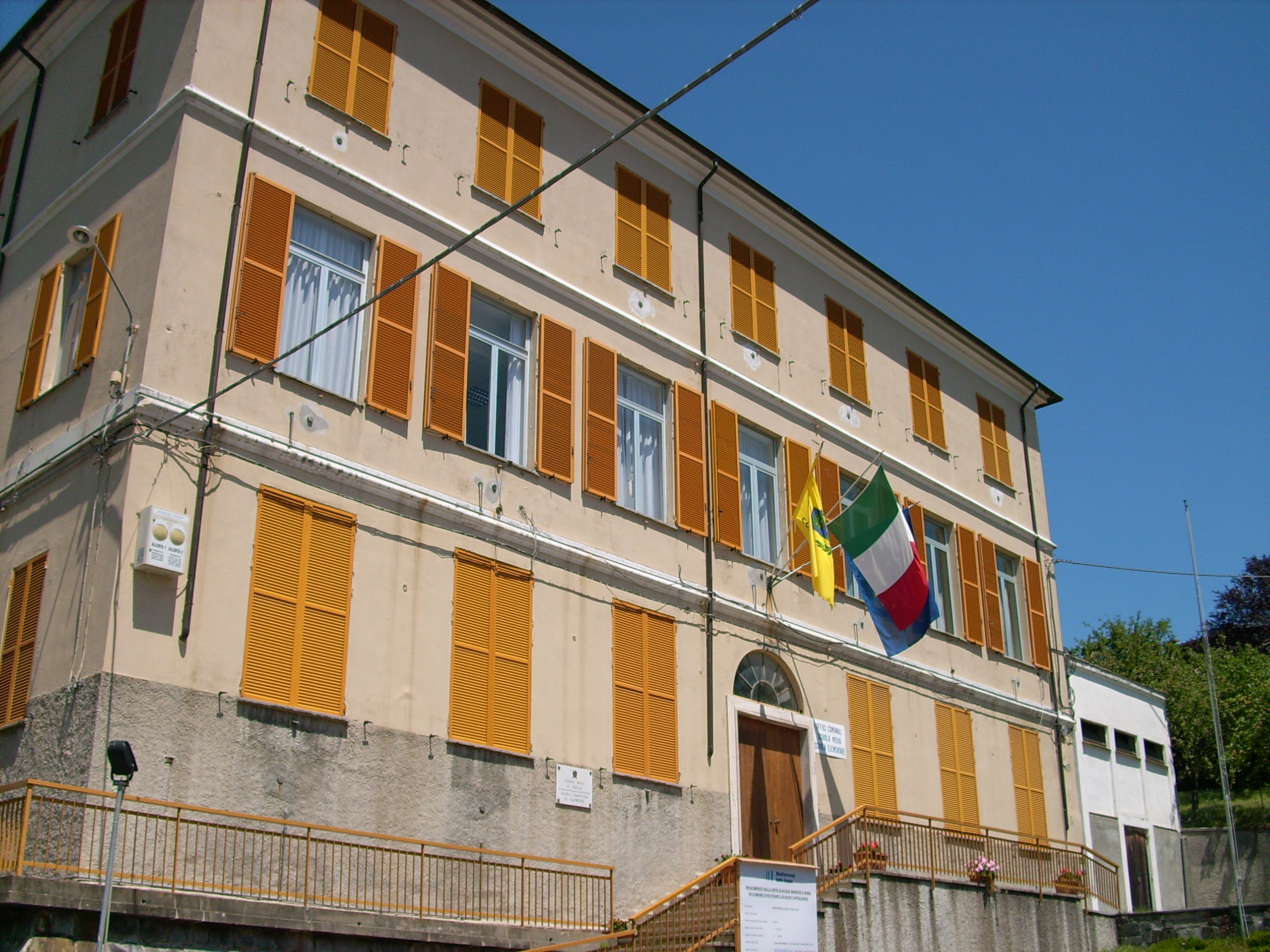 Municipio di Rovegno, Liguria, Italia